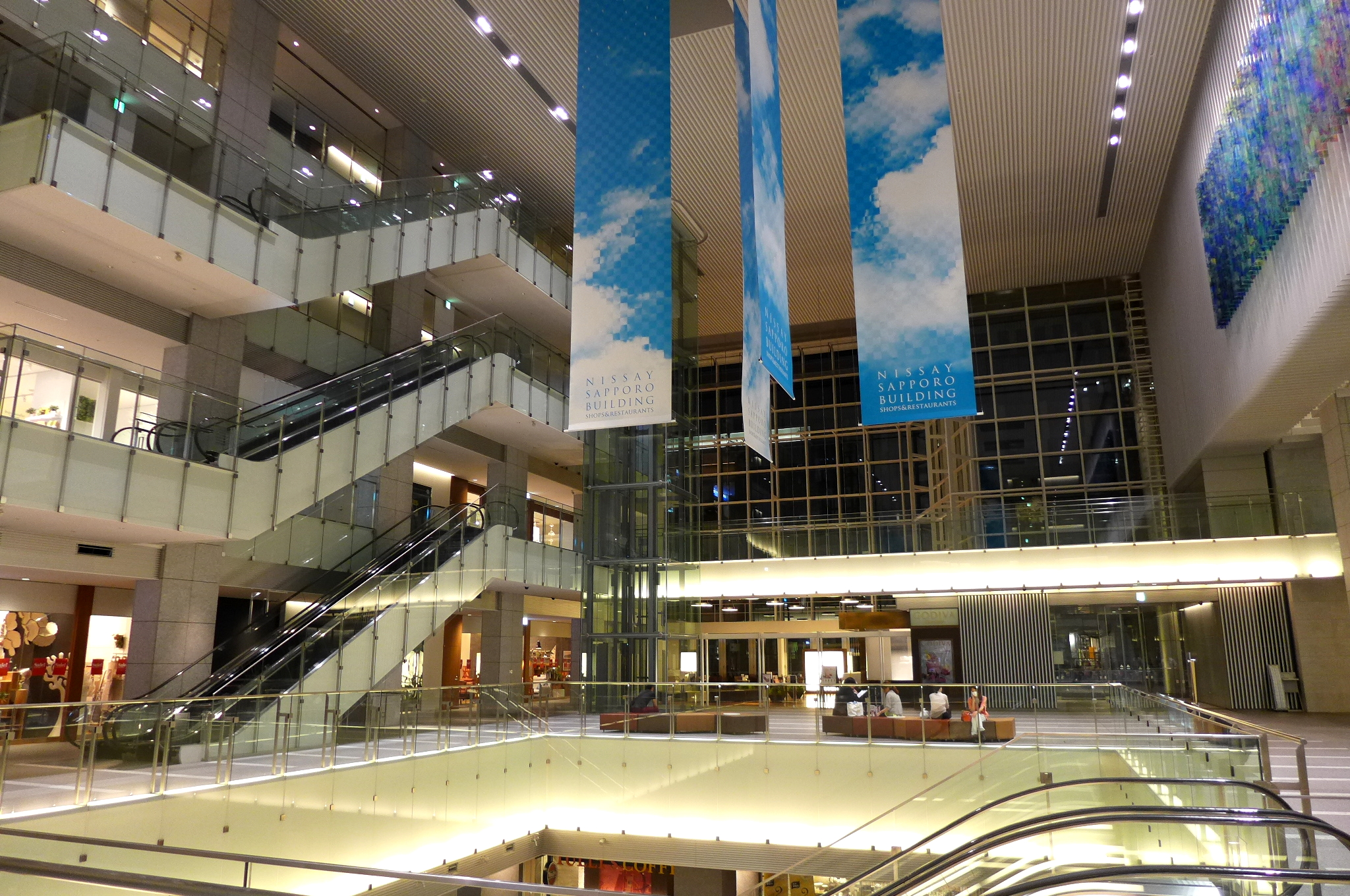 Nihonseimei Sapporo Bldg Atrium